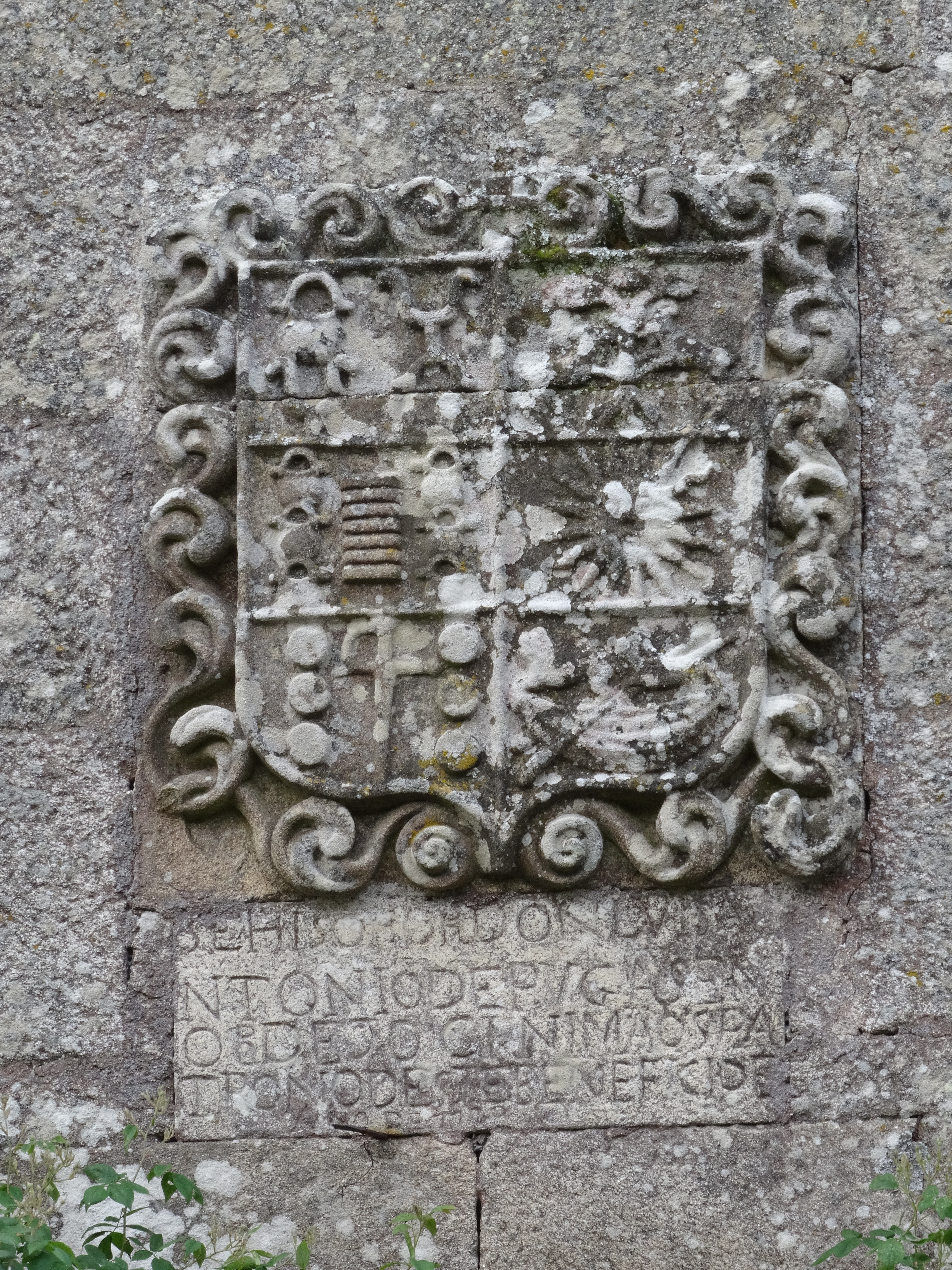 Ver título.